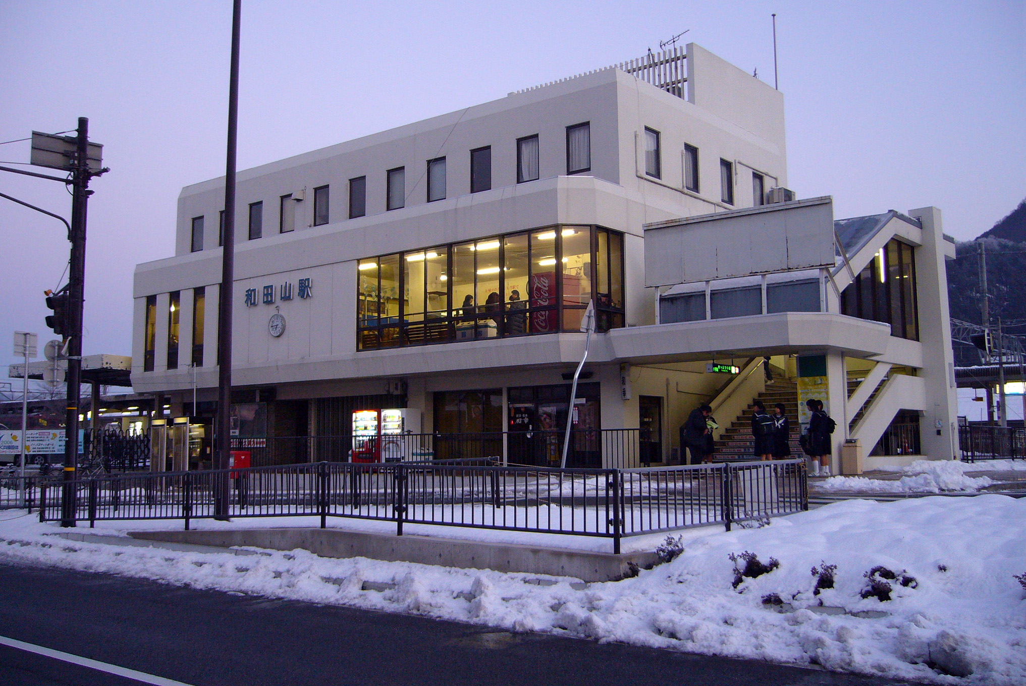 Wadayama Station in Asago, Hyogo, Japan